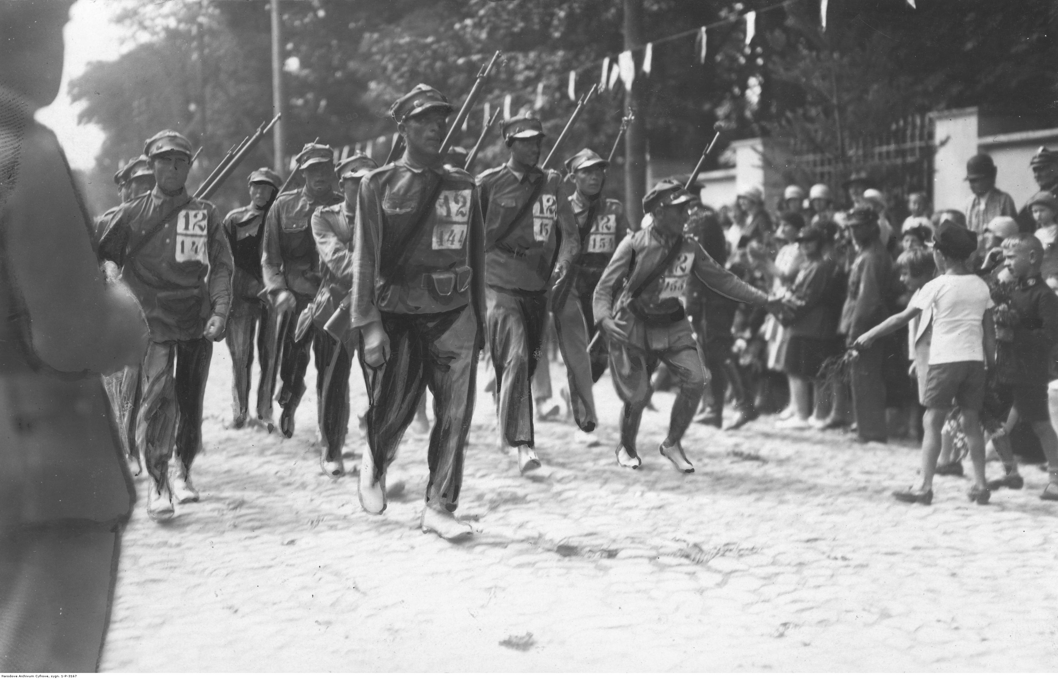 Marsz szlakiem "kadrówki" w rocznicę wymarszu Pierwszej Kompanii Kadrowej. Zwycięska drużyna 33 pułku piechoty na mecie. Koncern Ilustrowany Kurier Codzienny - Archiwum Ilustracji. Sygnatura: 1-P-3167